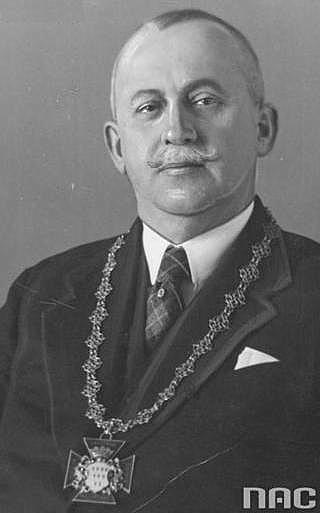 Rajmund Jarosz